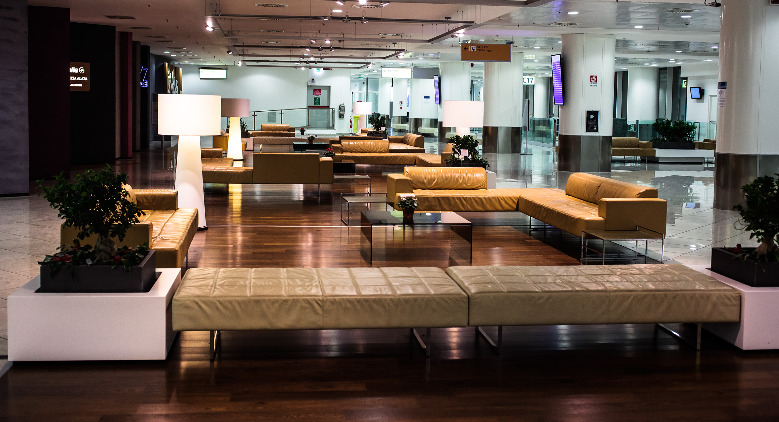 Napoli, Italy at 4:53 a.m.